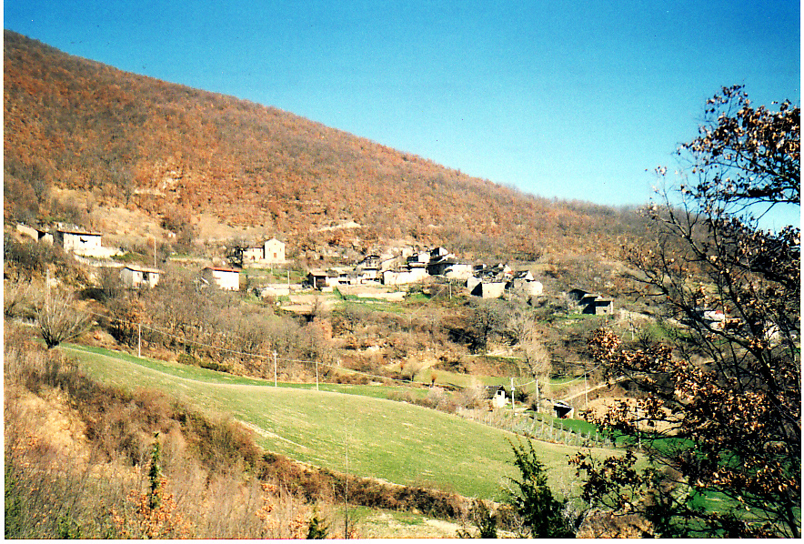 opera propria, foto, frazione S.Cristoforo di Bobbio, licenza libera